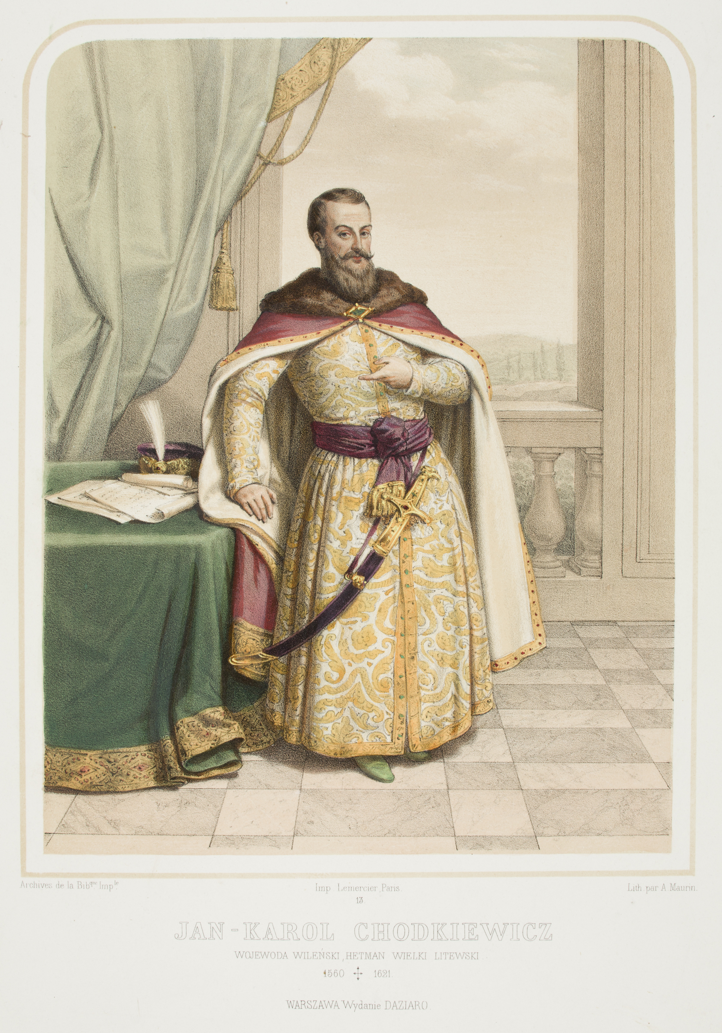 Беларуская (тарашкевіца): Партрэт Яна Караля Хадкевіча (Jan Karal Chadkievič)